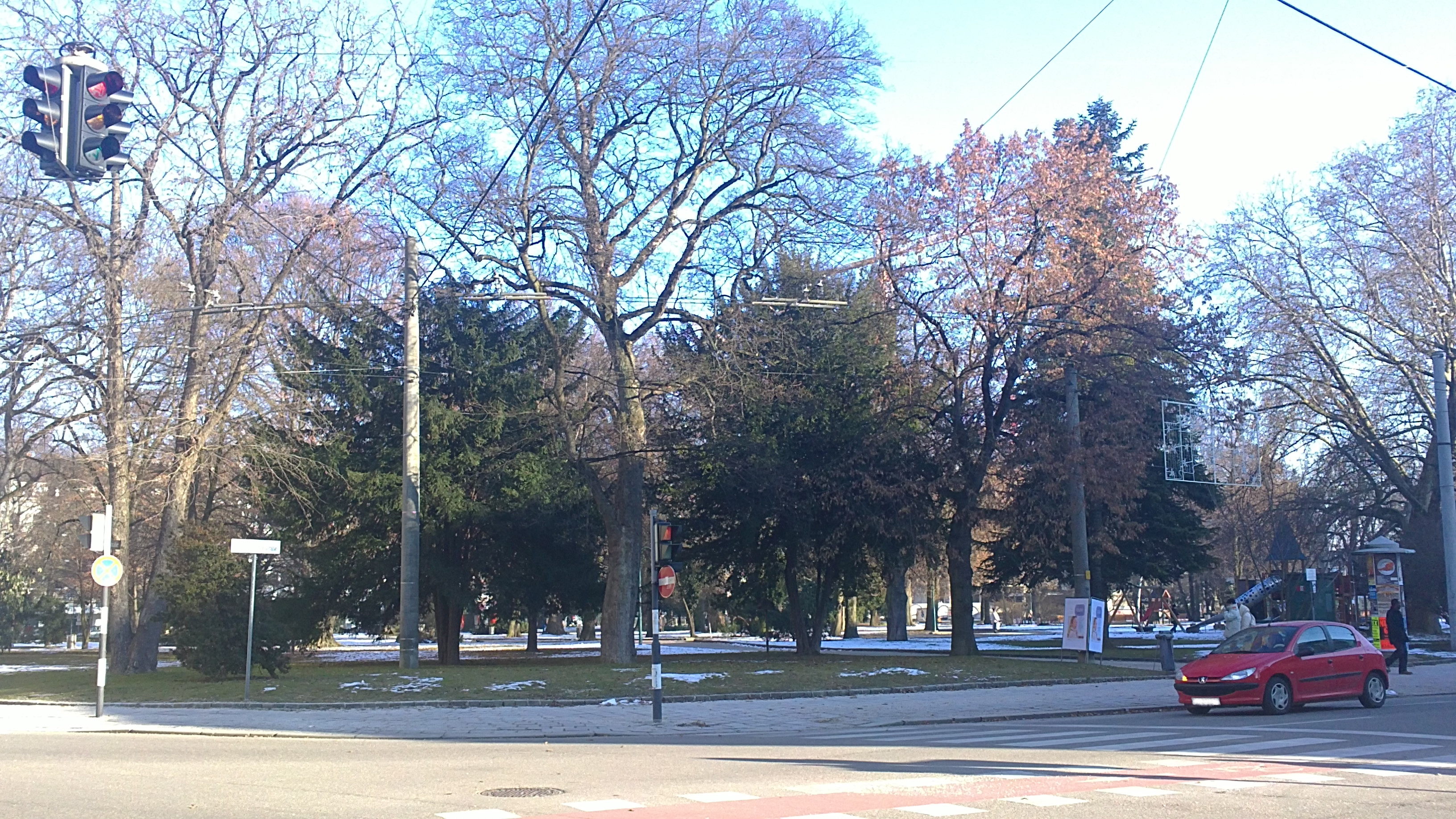 Der Volksgarten an der Ecke Volksgartenstraße/Goethestraße